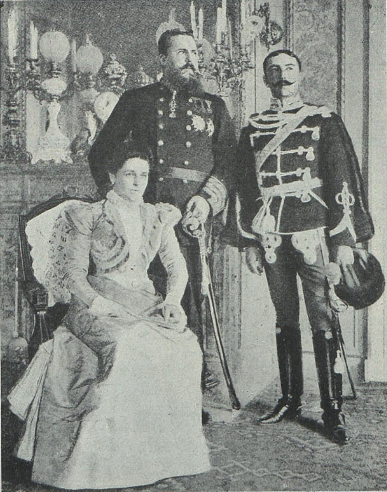 Don Carlos junto a su hijo Don Jaime y su esposa Doña Berta